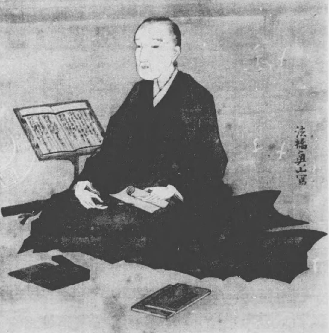 小島蕉園肖像 （静岡県小笠郡平田村下平川医師本間精氏蔵）